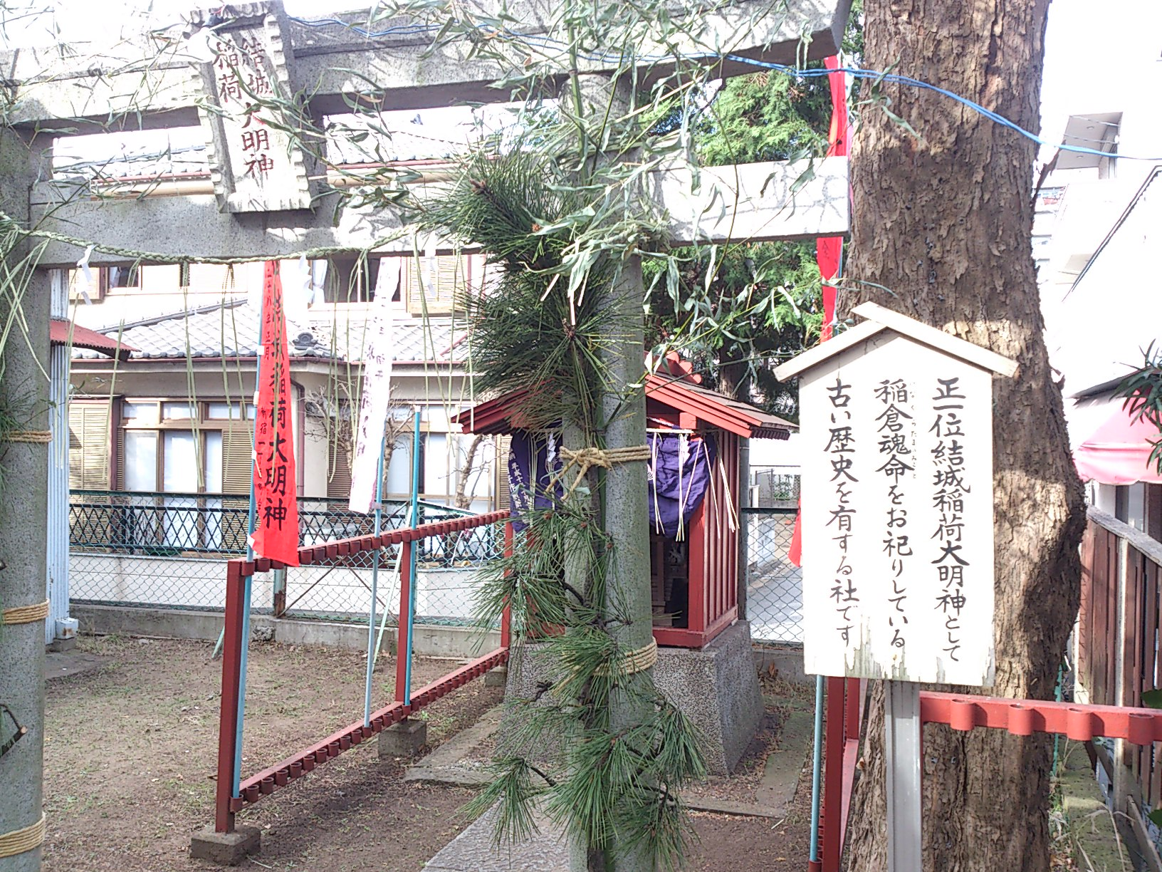 結城稲荷大明神（千葉市白幡神社境内）